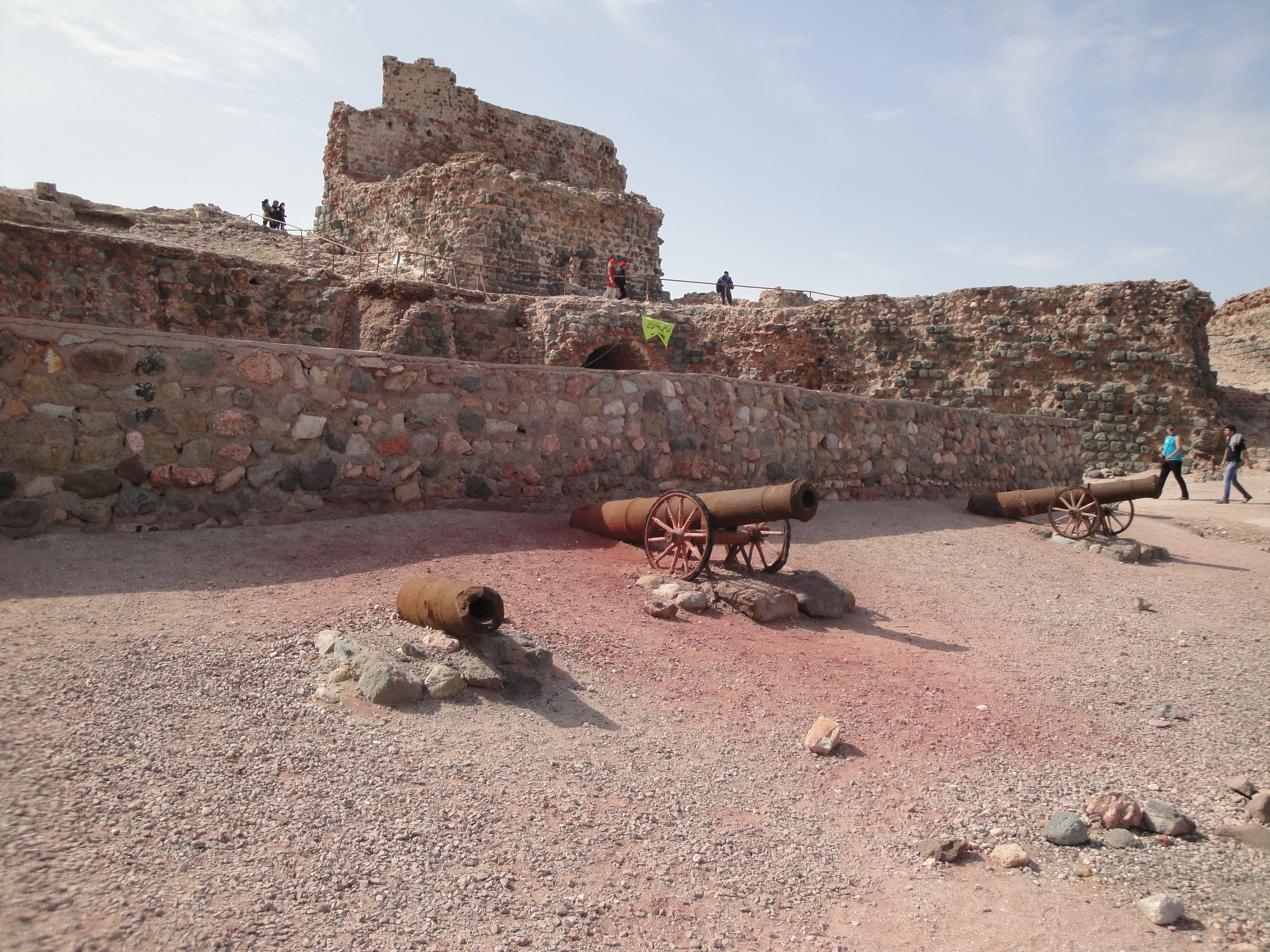 قلعه پرتقاليها Portuguese Castle